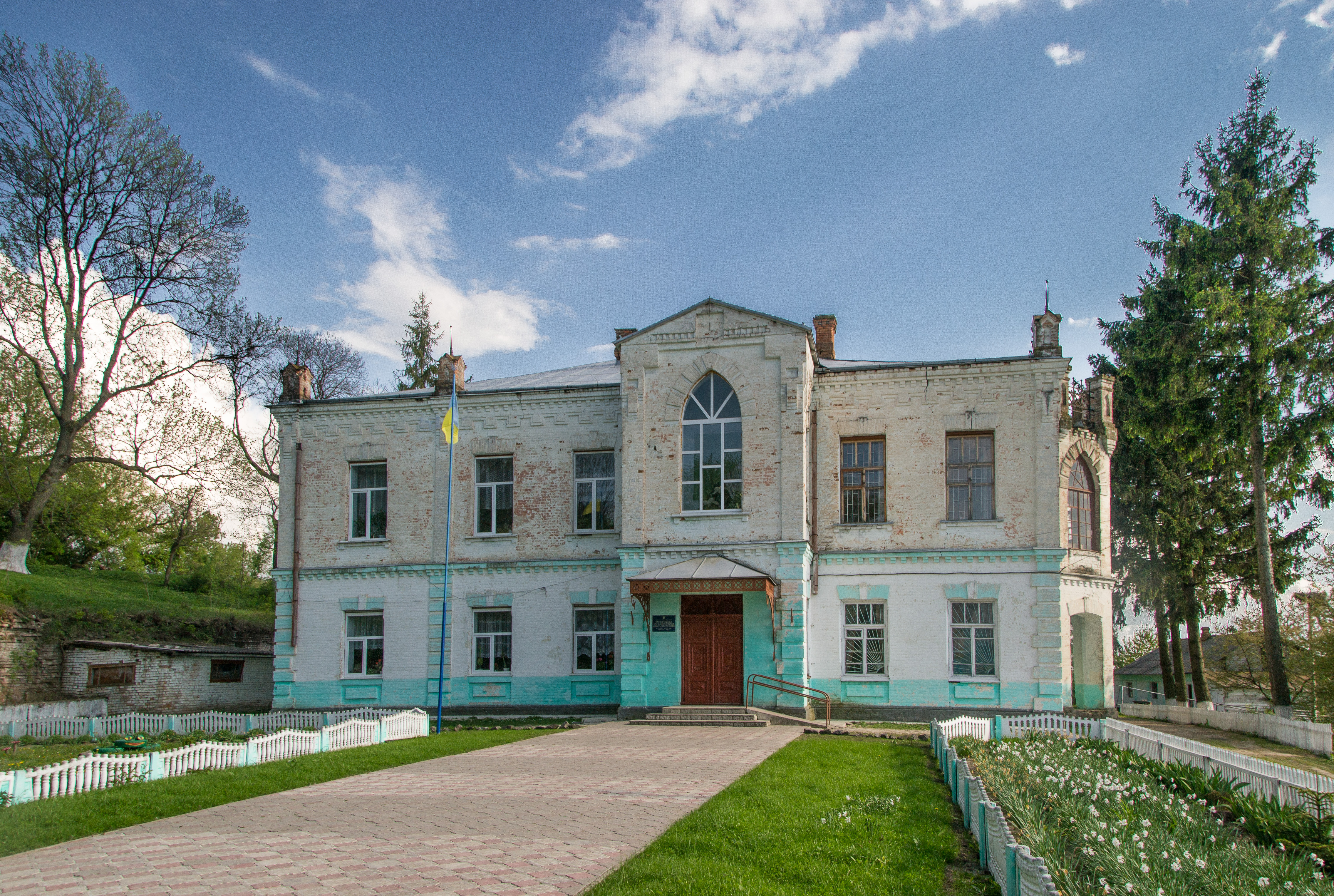 Садибний будинок (мур.), село Тарноруда